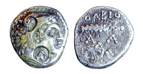 Монета из музейной коллекции. Ольвия. Дидрахма с двумя надчеканками. II в.до н.э.